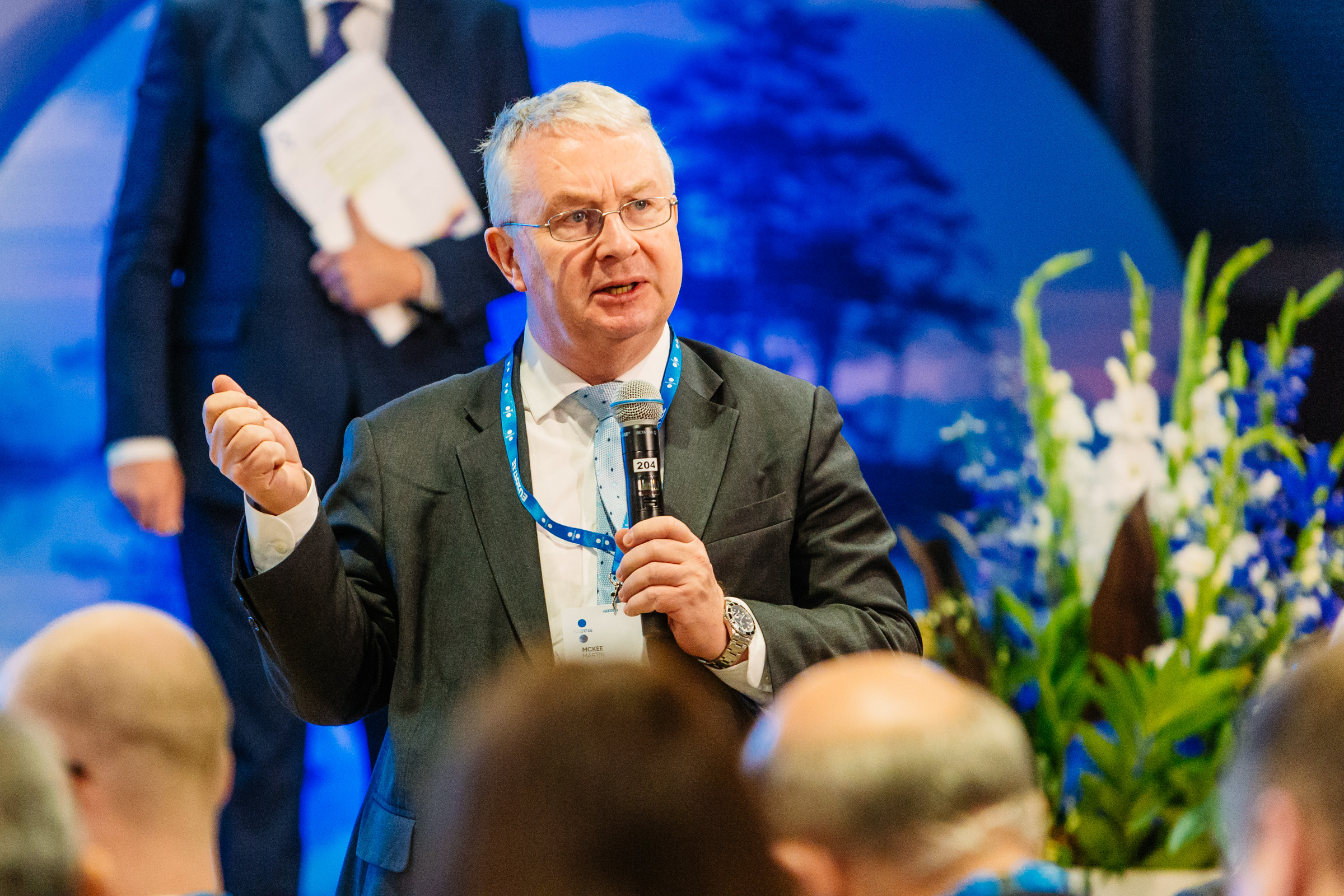 Photo: Arno Mikkor (EU2017EE)